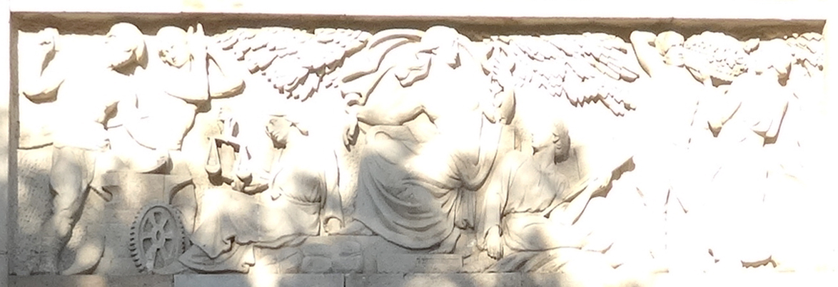 Српски (ћирилица): Рељеф - на улазу у зграду пореске управе Ваљеву аутор Владимир Загородњук